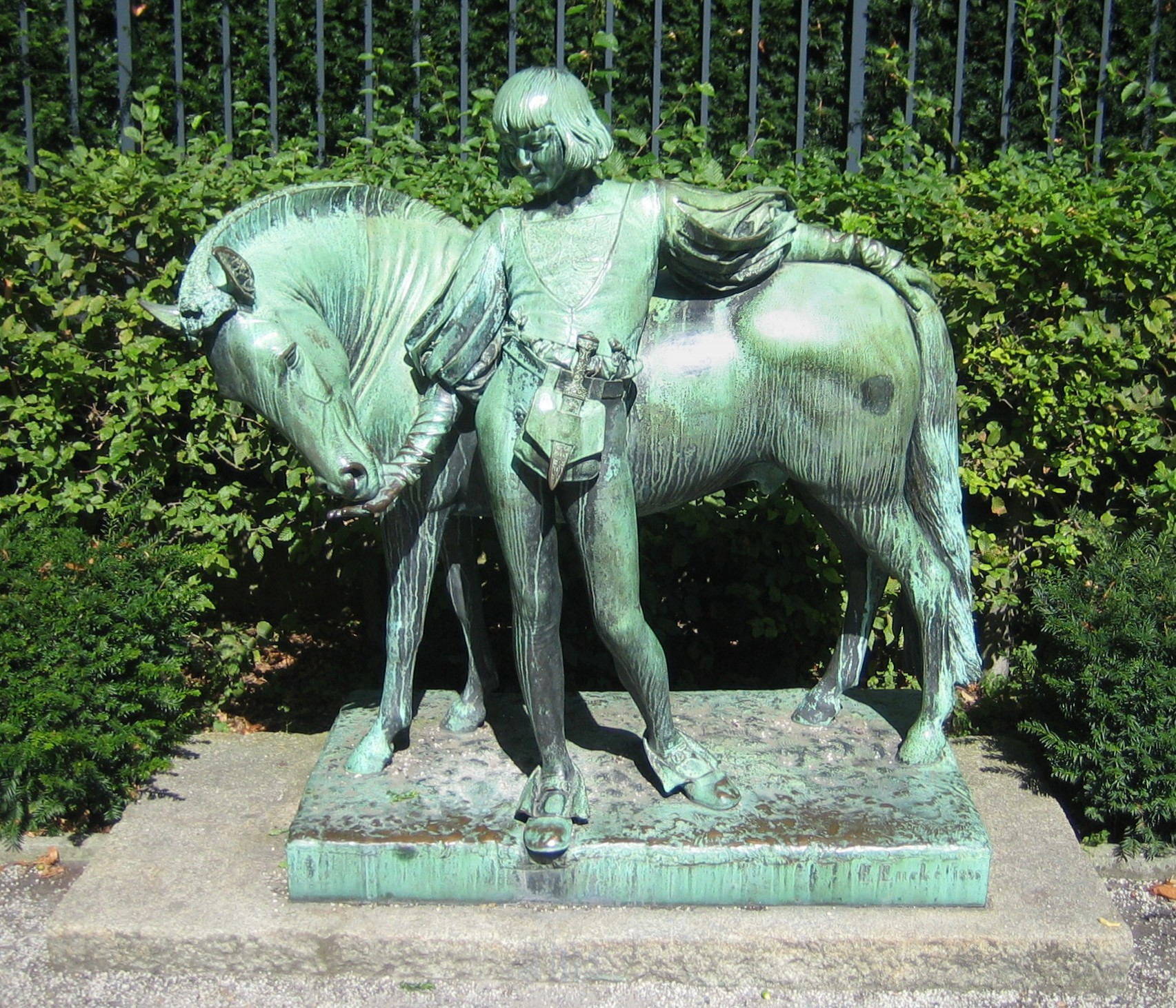 Bronzeplastik "Pony und Knappe" des deutschen Bildhauers Erdmann Encke (1843-1896), datiert 1896. Aufstellungsort: Der "Englische Garten" im Großen Tiergarten in Berlin (früher Schlosspark Bellevue).